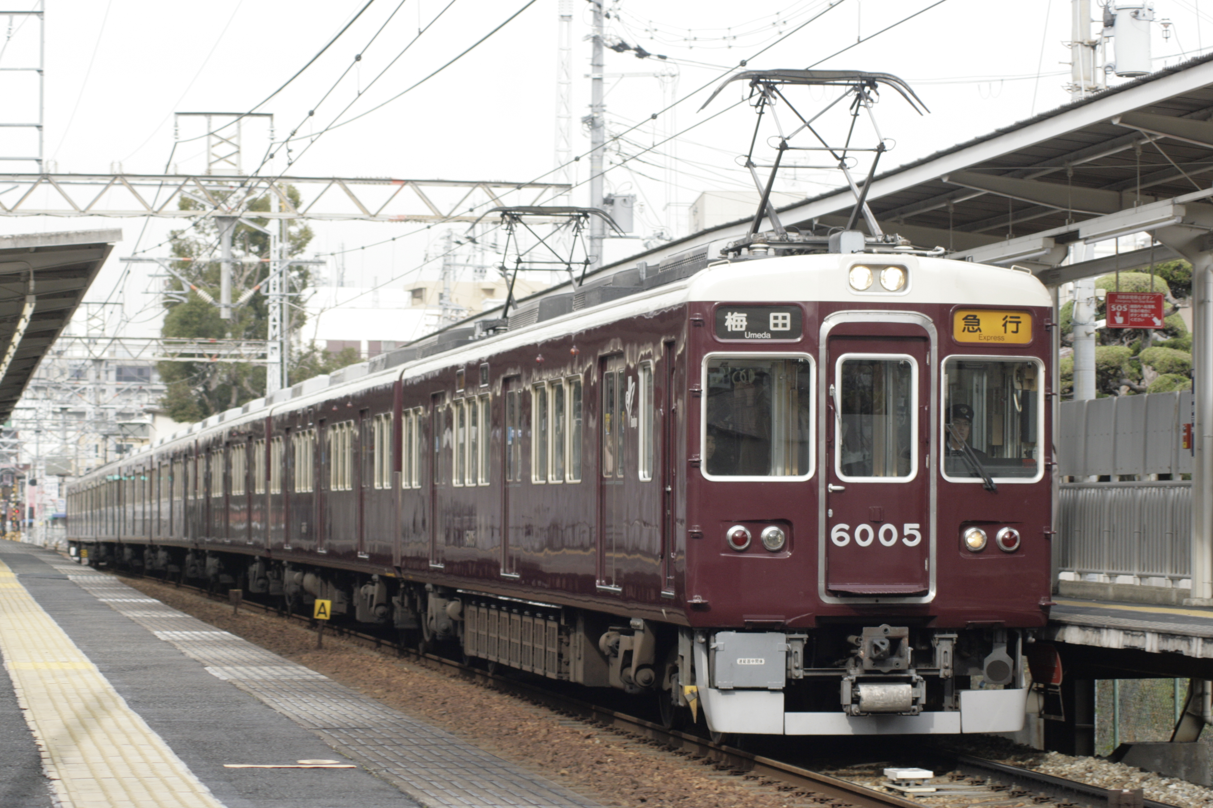 2019年12月21日 服部天神駅にて撮影。